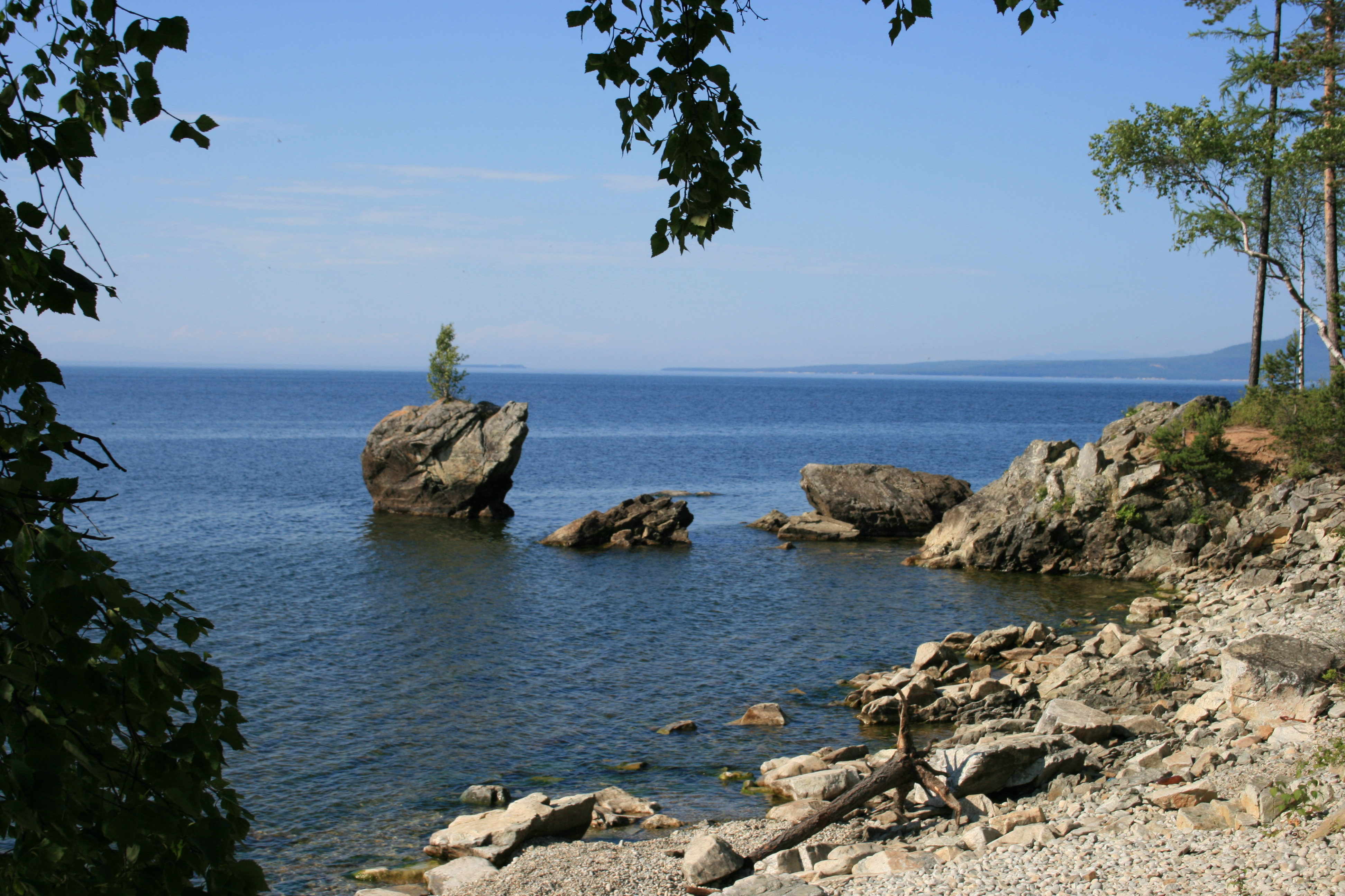 Памятник природы "Черепаха-камень" в окрестностях Турки, Прибайкальский район, Бурятия This image is related to the protected area of Russia number 0310152